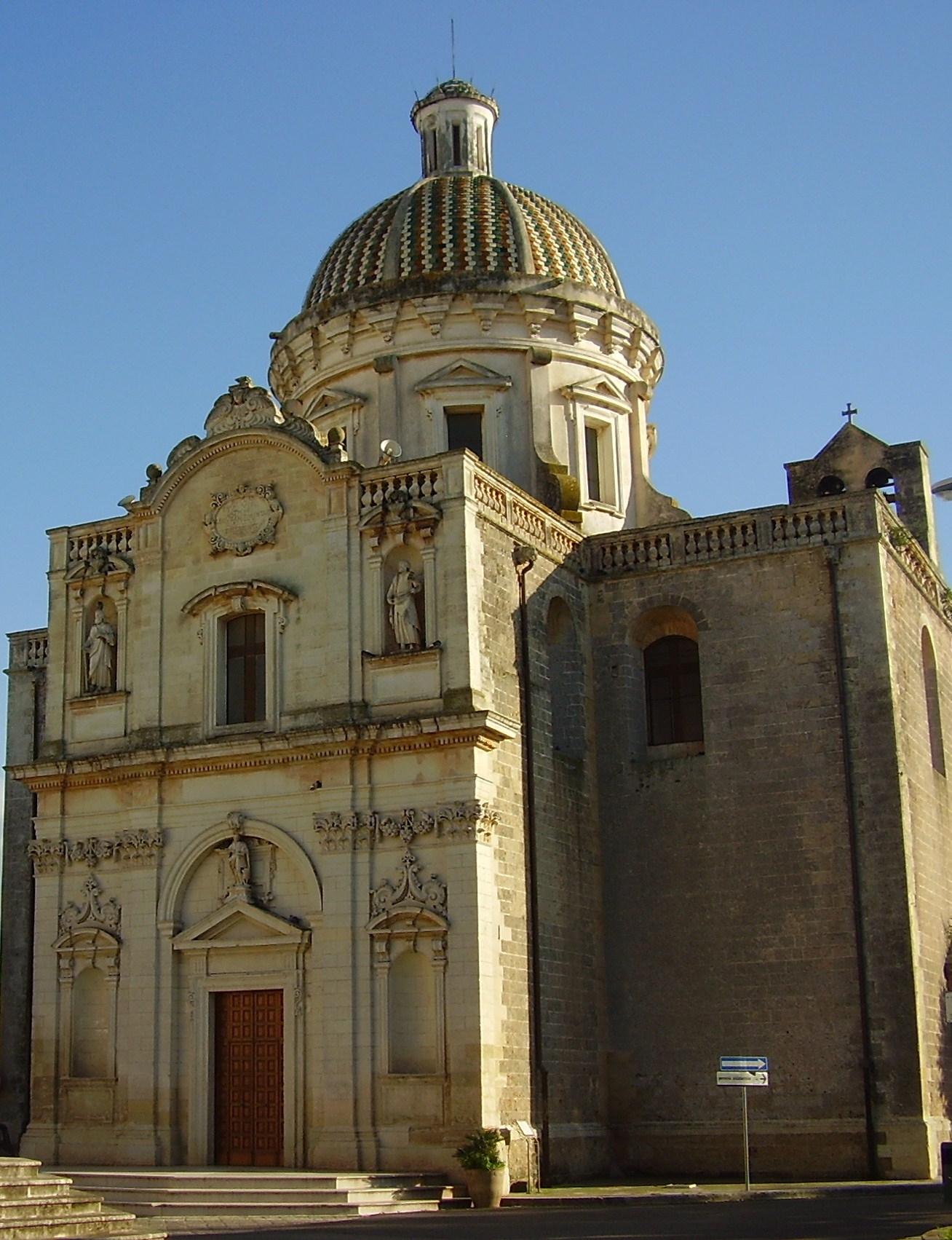 Chiesa San Vito Lequile, Lecce